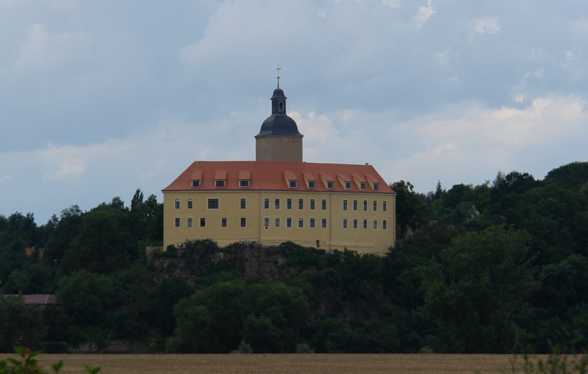 Schloß Hirschstein zwischen Meißen und Riesa